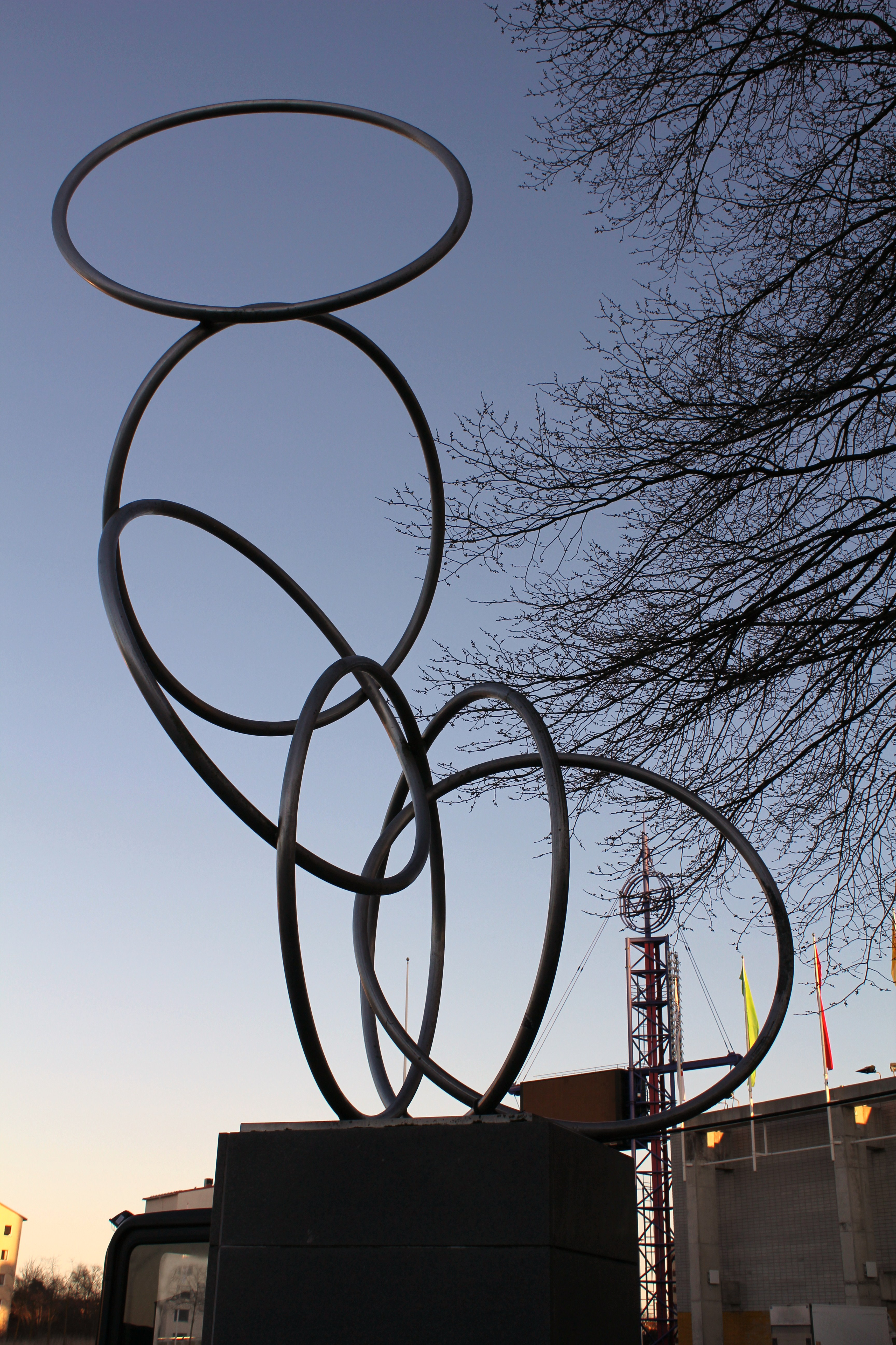 Lekande ringar av Leo Janis Brieditis utanför Johanneshovs isstadion. Rest 1968.